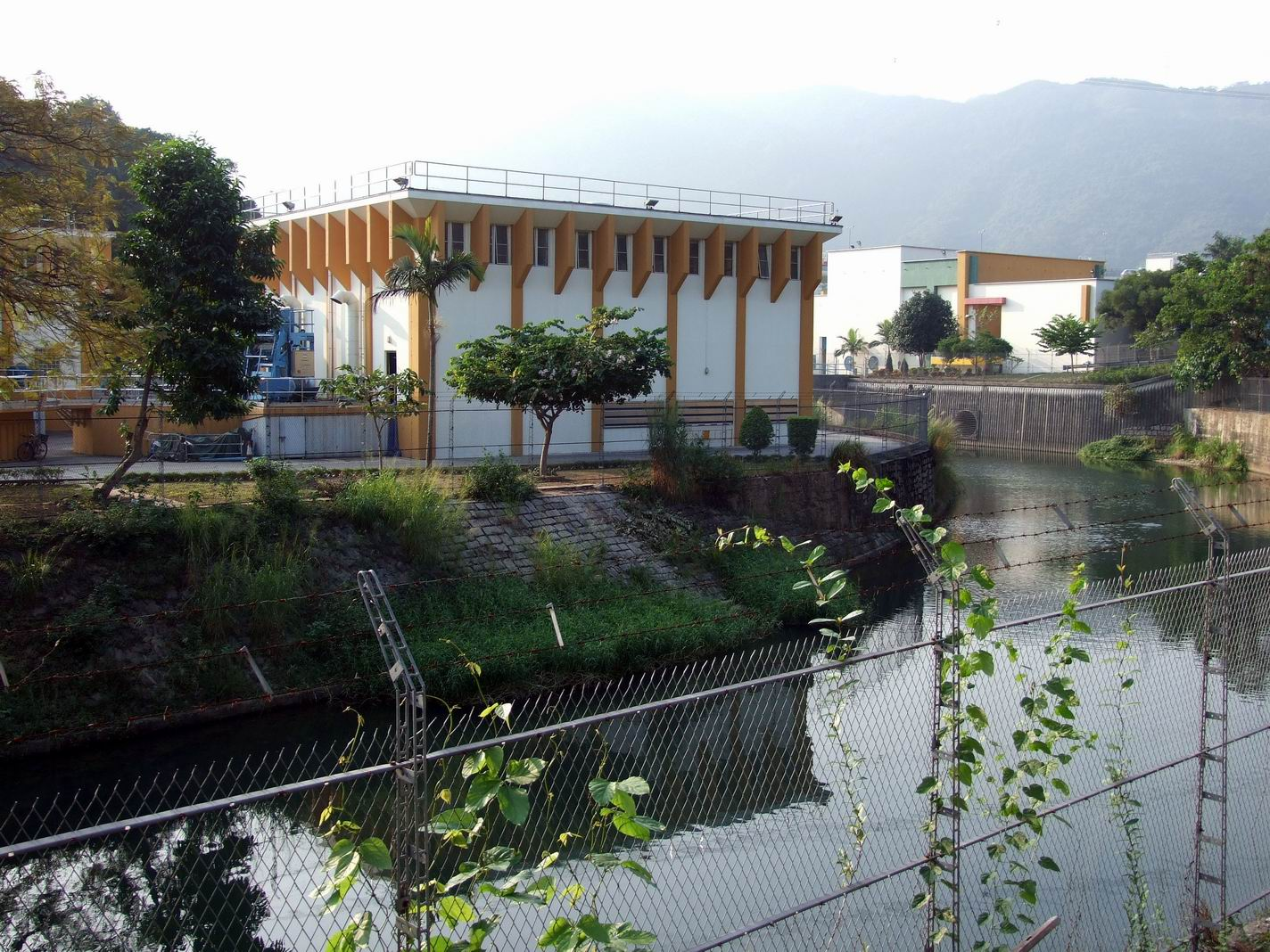 大埔頭抽水站